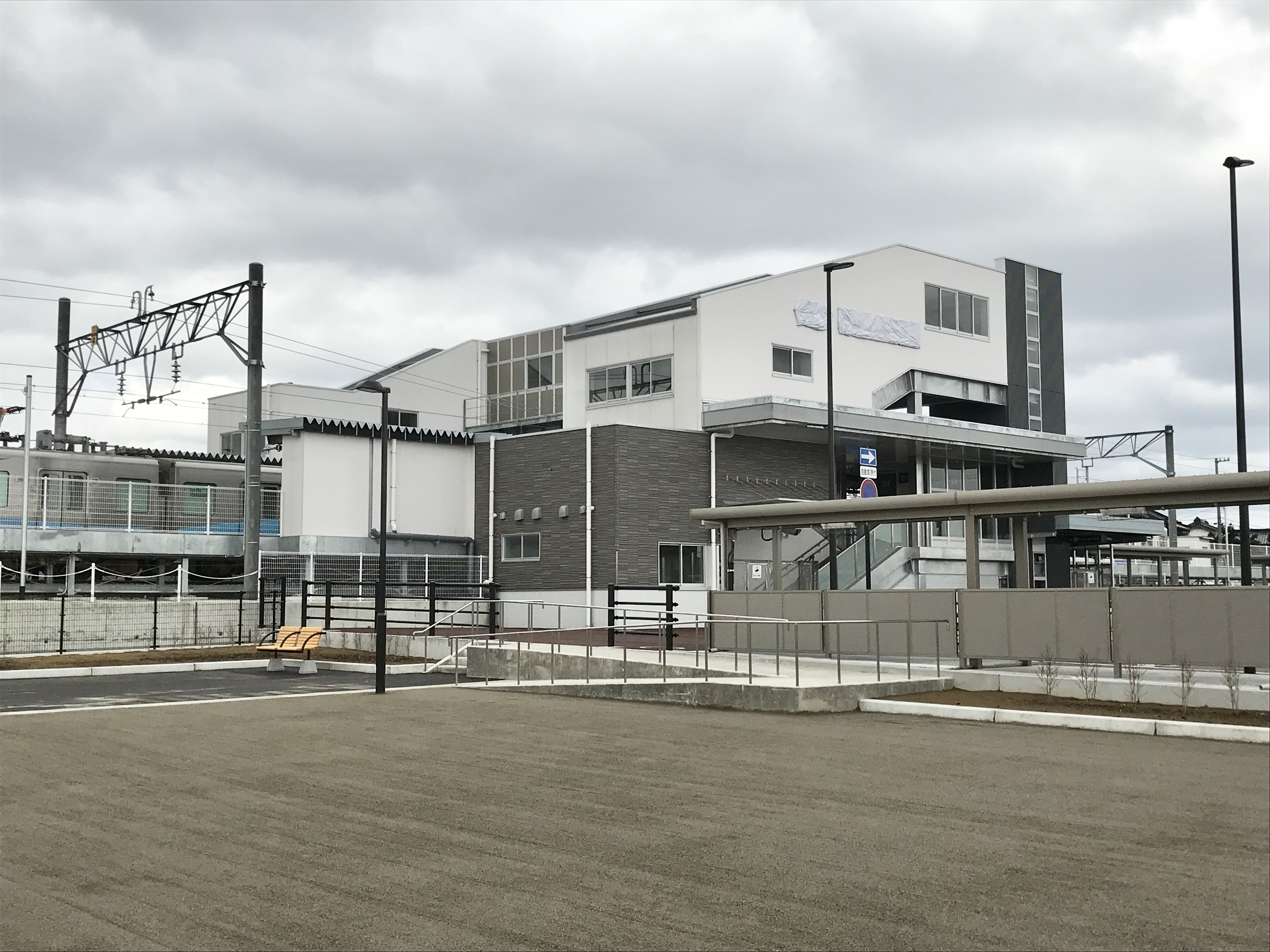 あいの風とやま鉄道高岡やぶなみ駅 駅舎（東口）